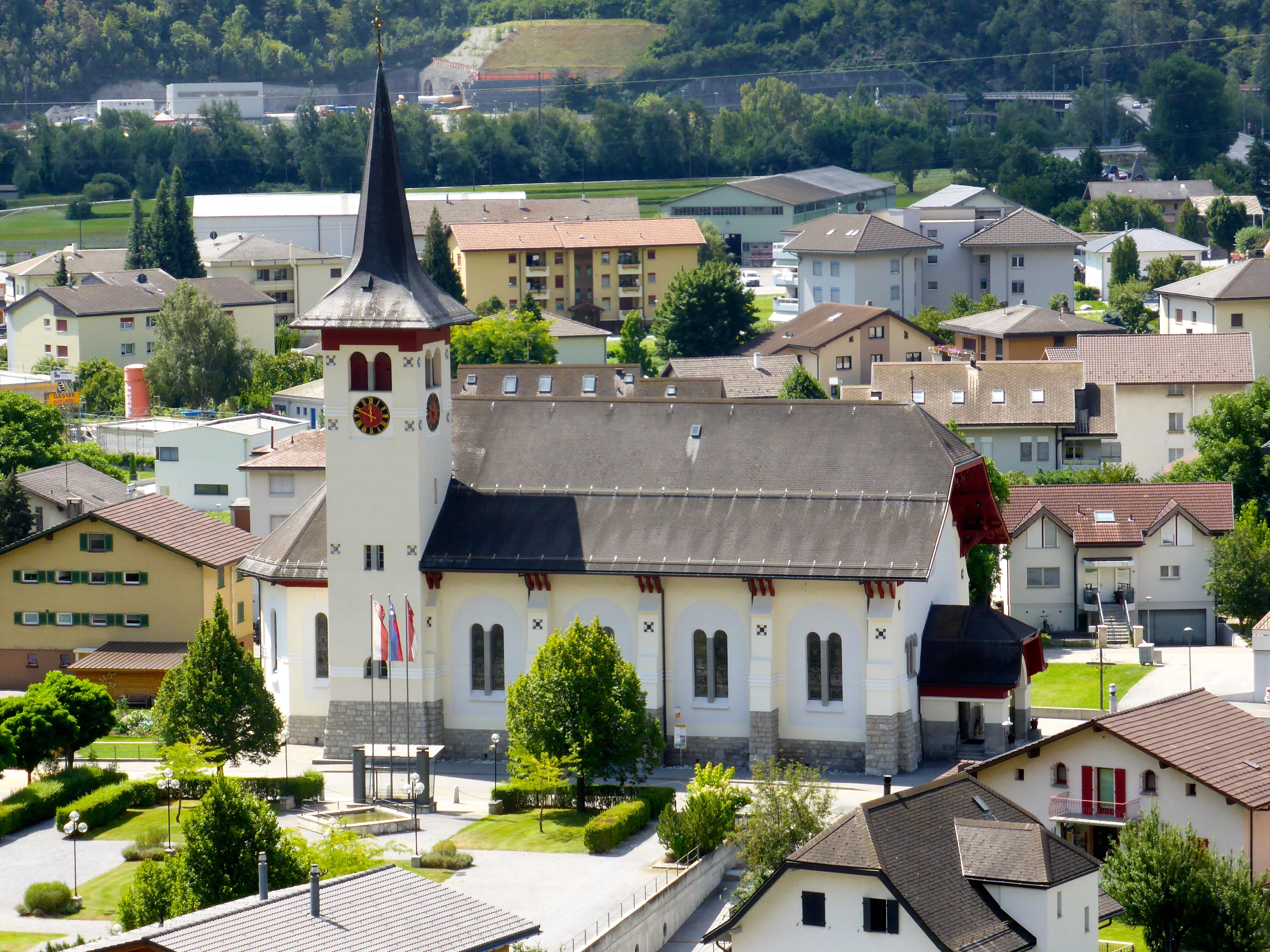 L'église du village de Steg